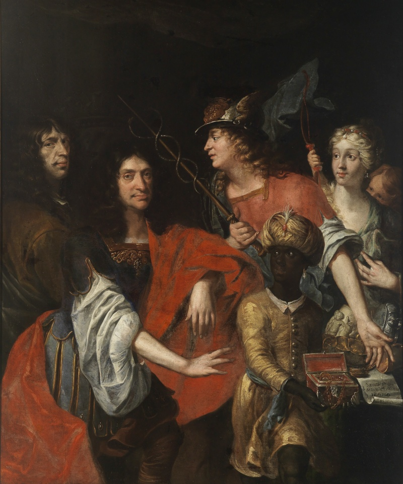 Staatliche Kunsthalle Karlsruhe Inv.-Nr. 1164, (nicht druckfähige Version), mit freundlicher Genehmigung. Literatur: Georg Ulrich Großmann (Hrsg.): Von teutscher Not zu höfischer Pracht : 1648 - 1701. Ausstellungskatalog Germanisches Nationalmuseum Nürnberg, 2. April - 16. August 1998, Kat-Nr. 102.